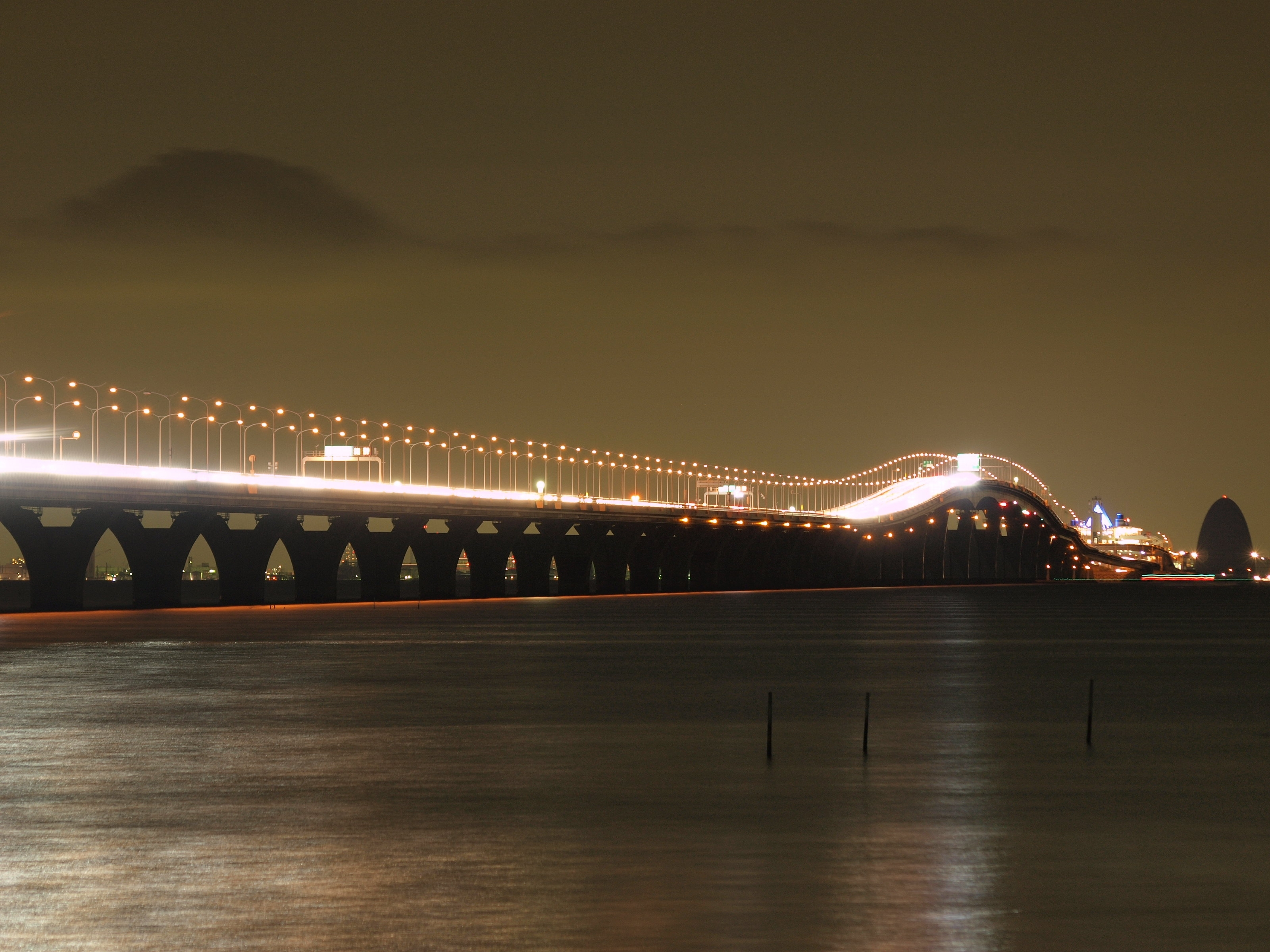 Aqua Bridge , Chiba